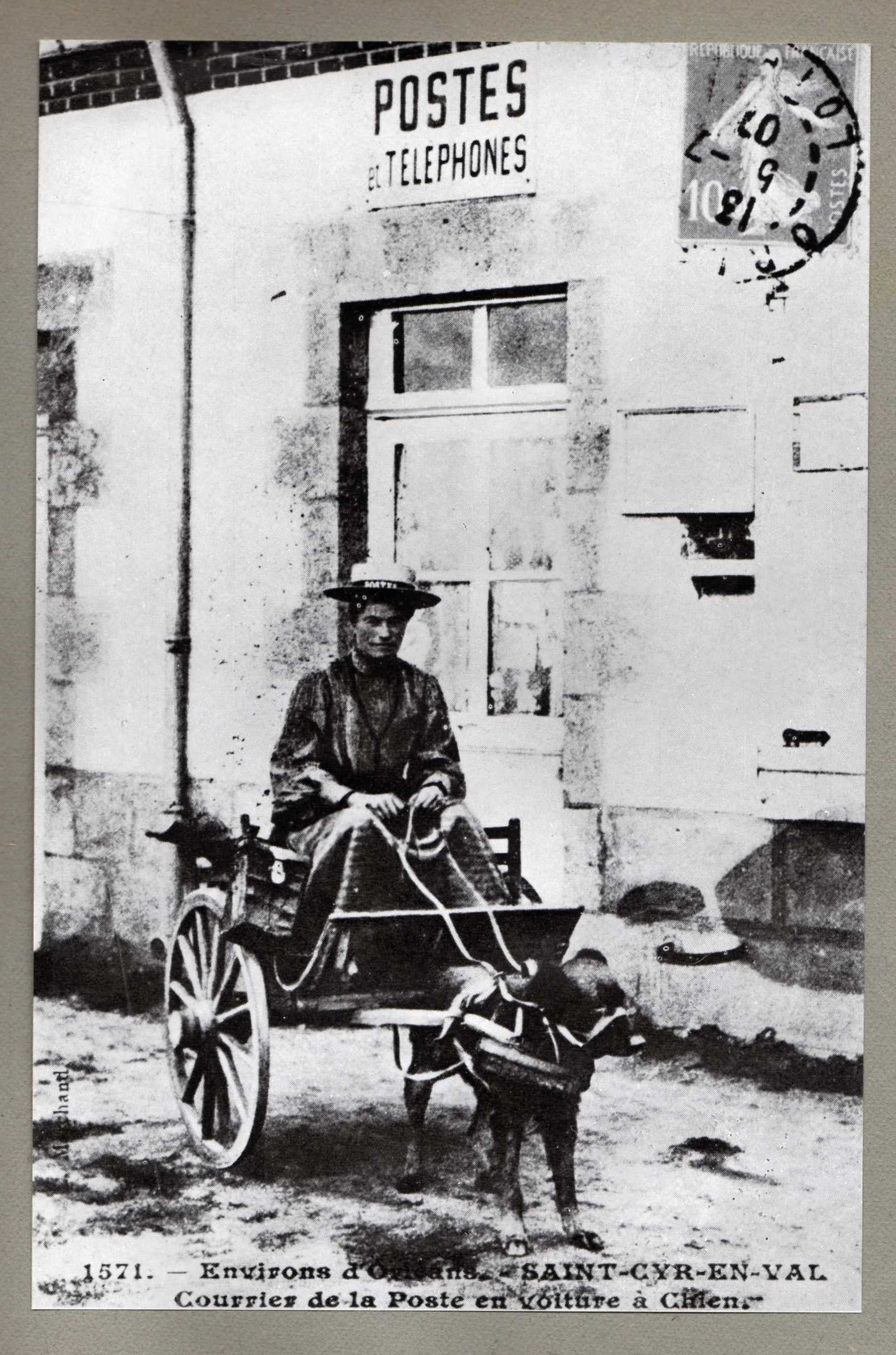 courrier de la poste en voiture a chien à saint cyr en val (France)